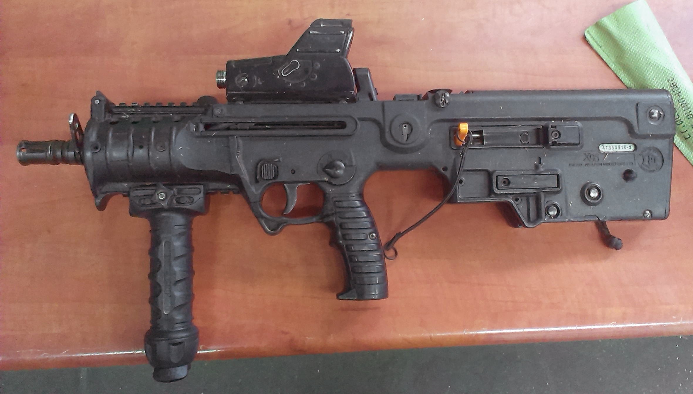 רובה מיקרו תבור X-95 עם כוונת מארס וידית הסתערות משולבת בדורגלים